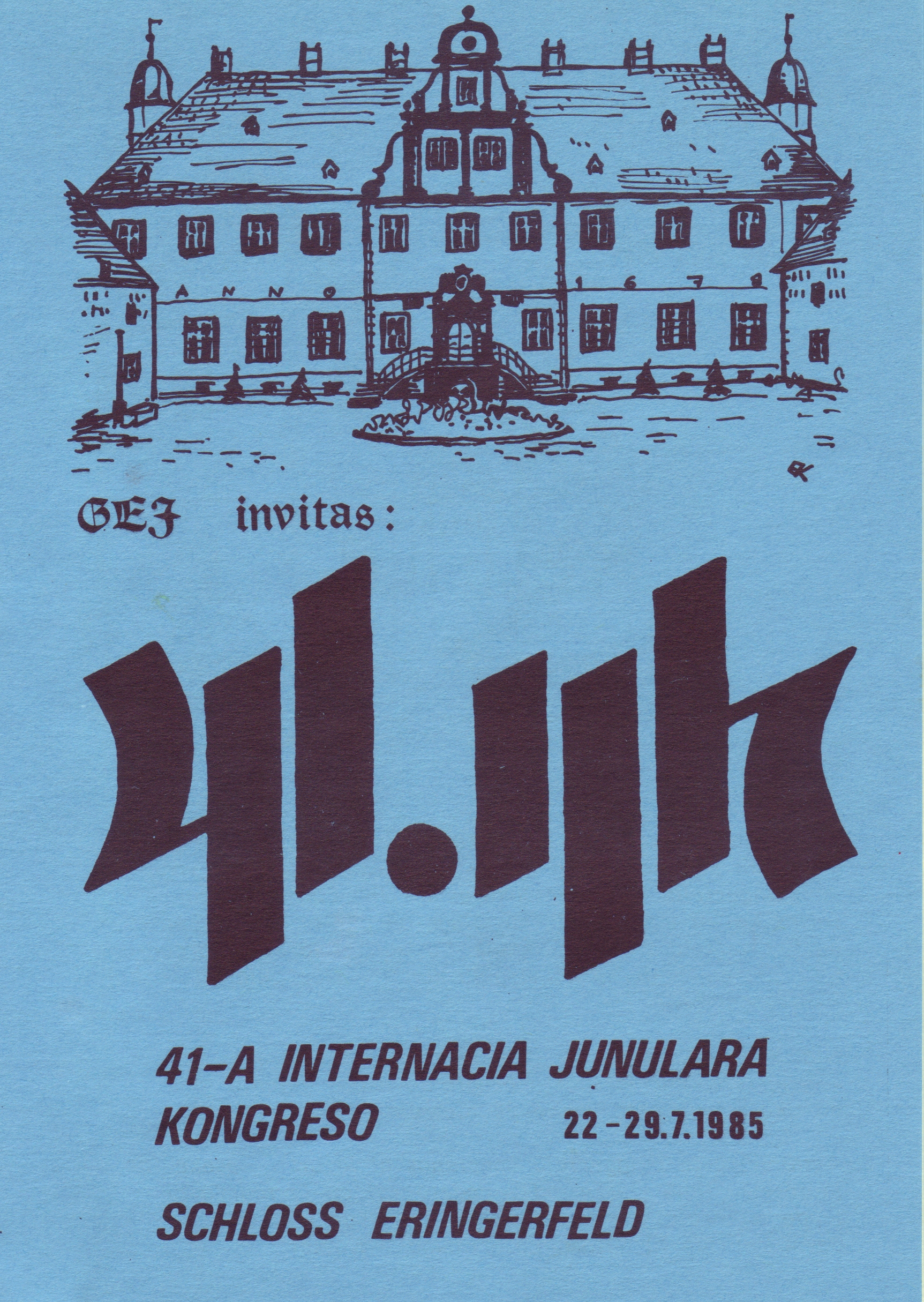 emblemo de la IJK 1985, grafika aranĝo Thomas Pusch, Thomas Bormann, Ella Klünder kaj Martin Weichert